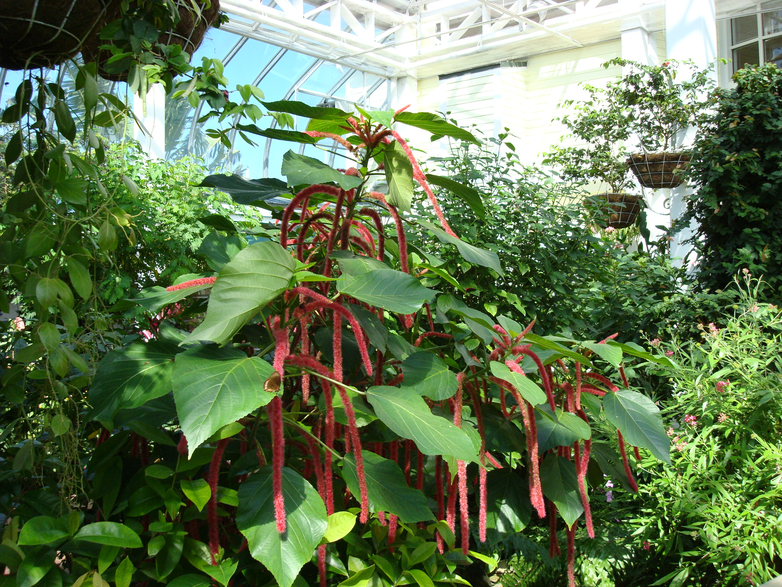 Butterfly Garden